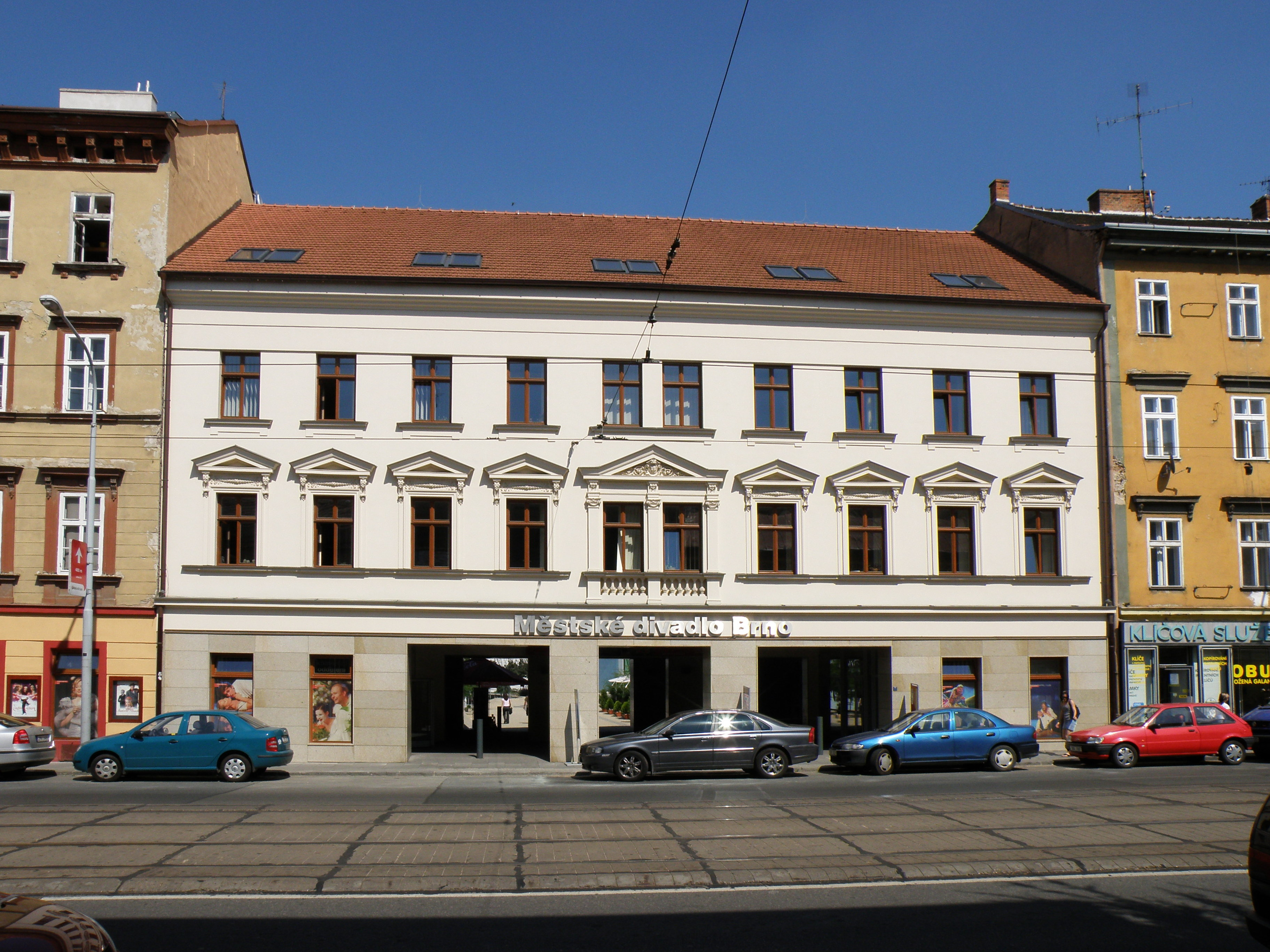 Vstup do komplexu budov Městského divadla Brno z ulice Lidická.